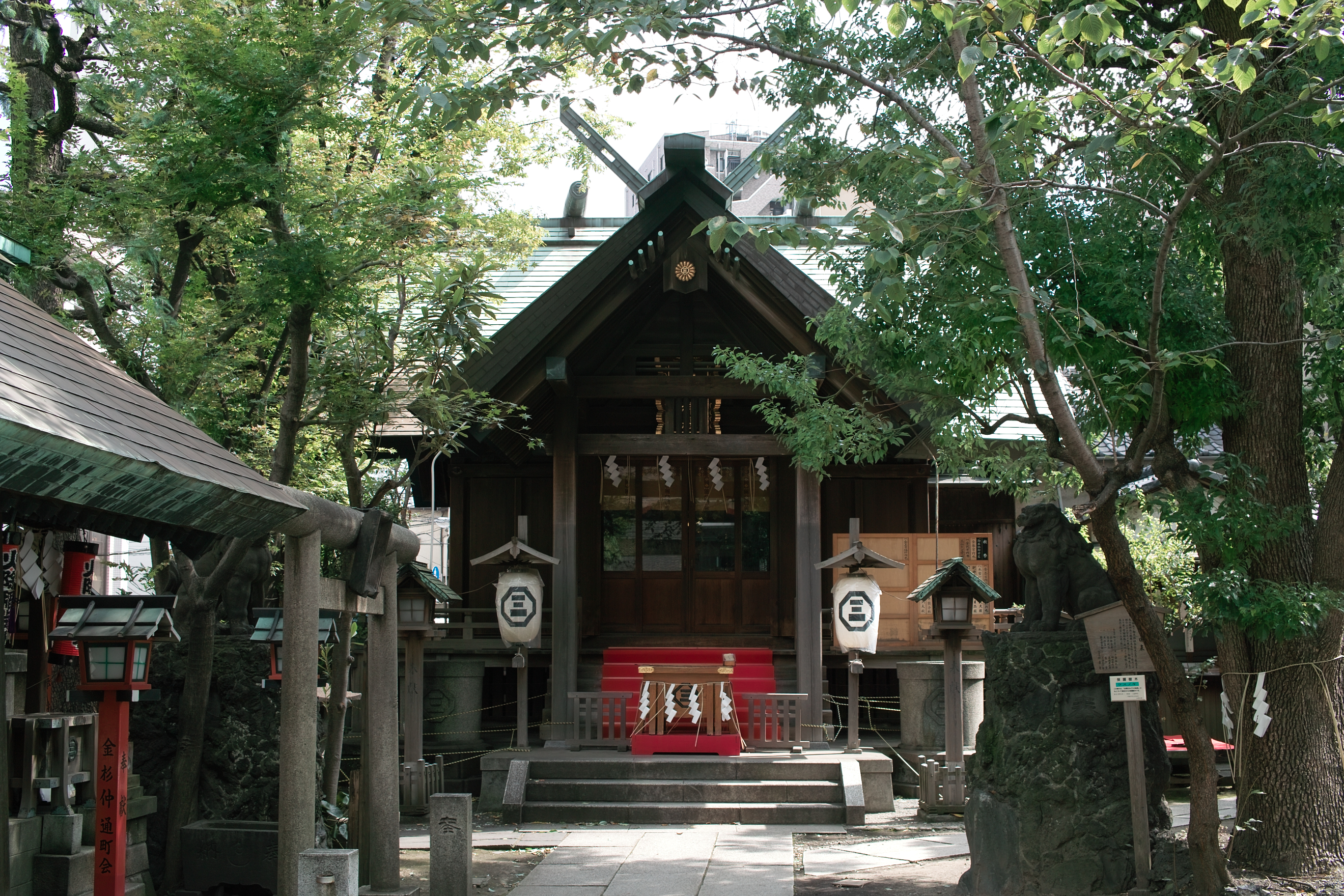 三島神社(下谷)